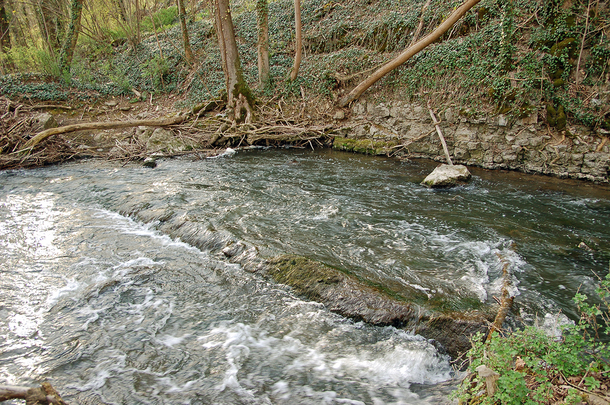 Relikt des Wehrs am Einlass zum ehemaligen Mühlkanal der Papiermühle Markgröningen